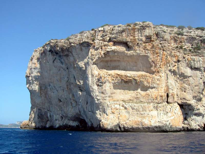 Punta Giglio visto dal mare